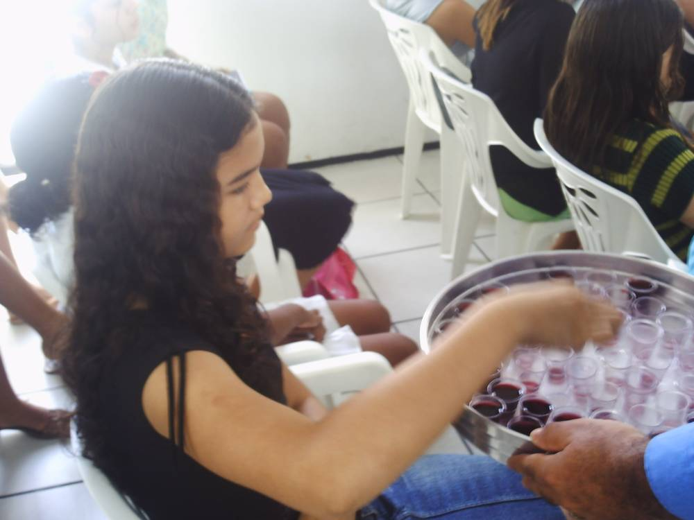 Santa Ceia Assembléia de Deus Montese